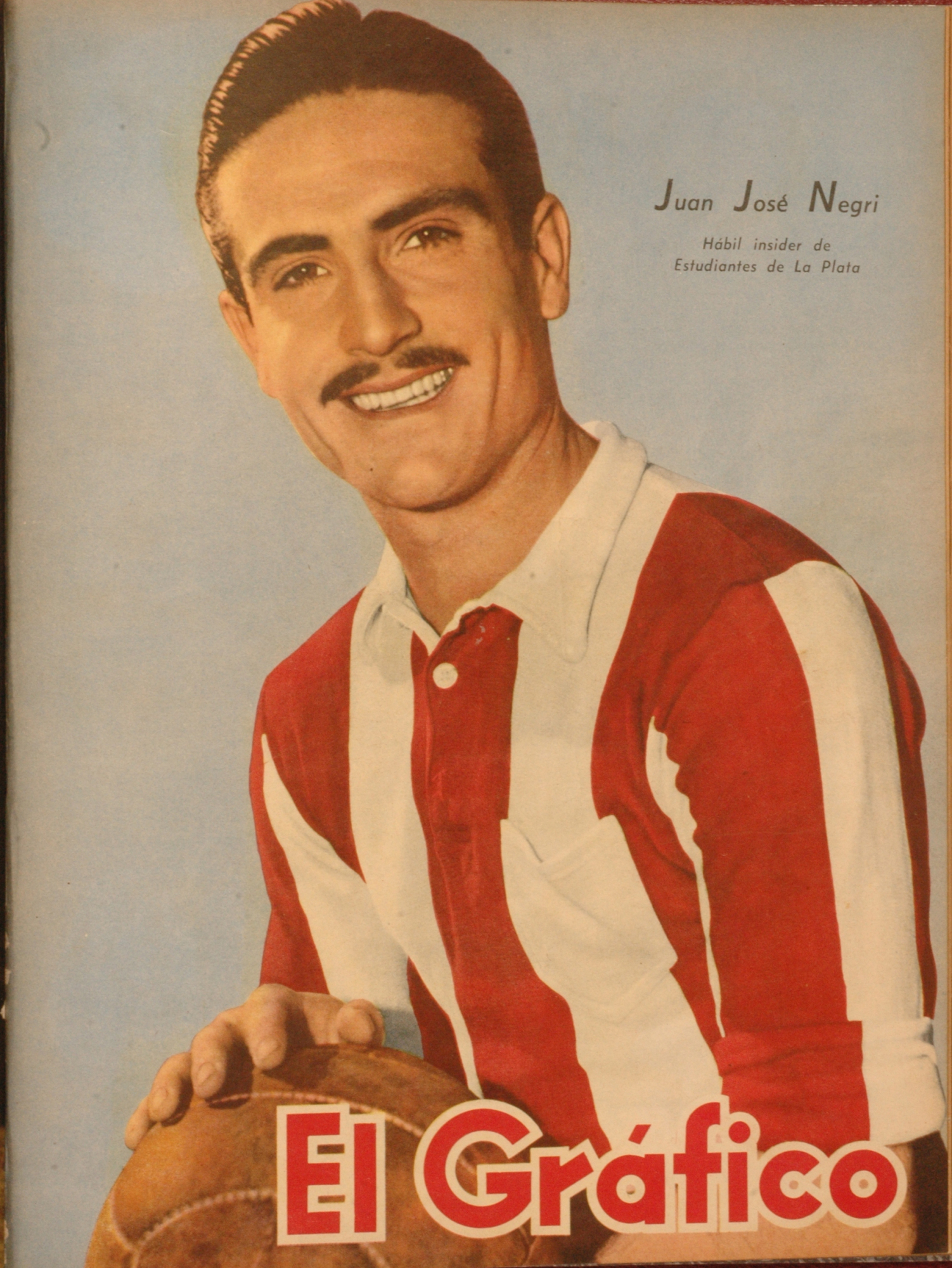 El Grafico del 30 de Octubre de 1942. Edicion 1216